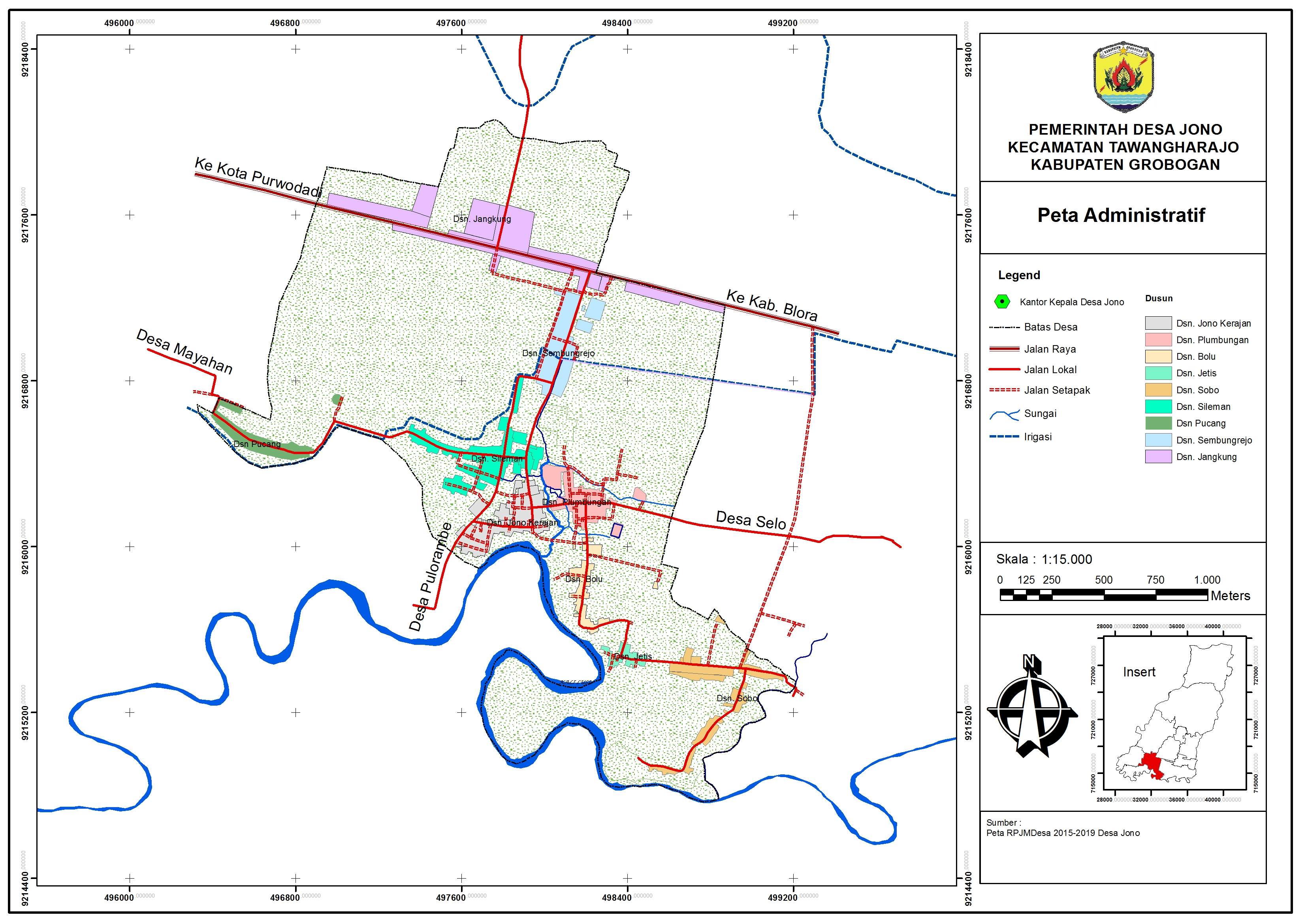 Peta Administrasi Ds. Jono